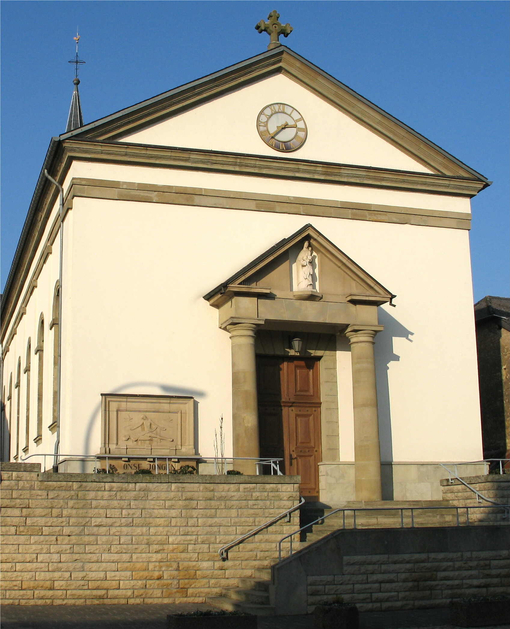 L'église de Bous (Luxembourg)